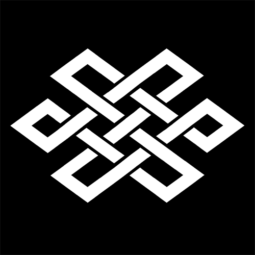 「菱宝結び」紋（染抜）